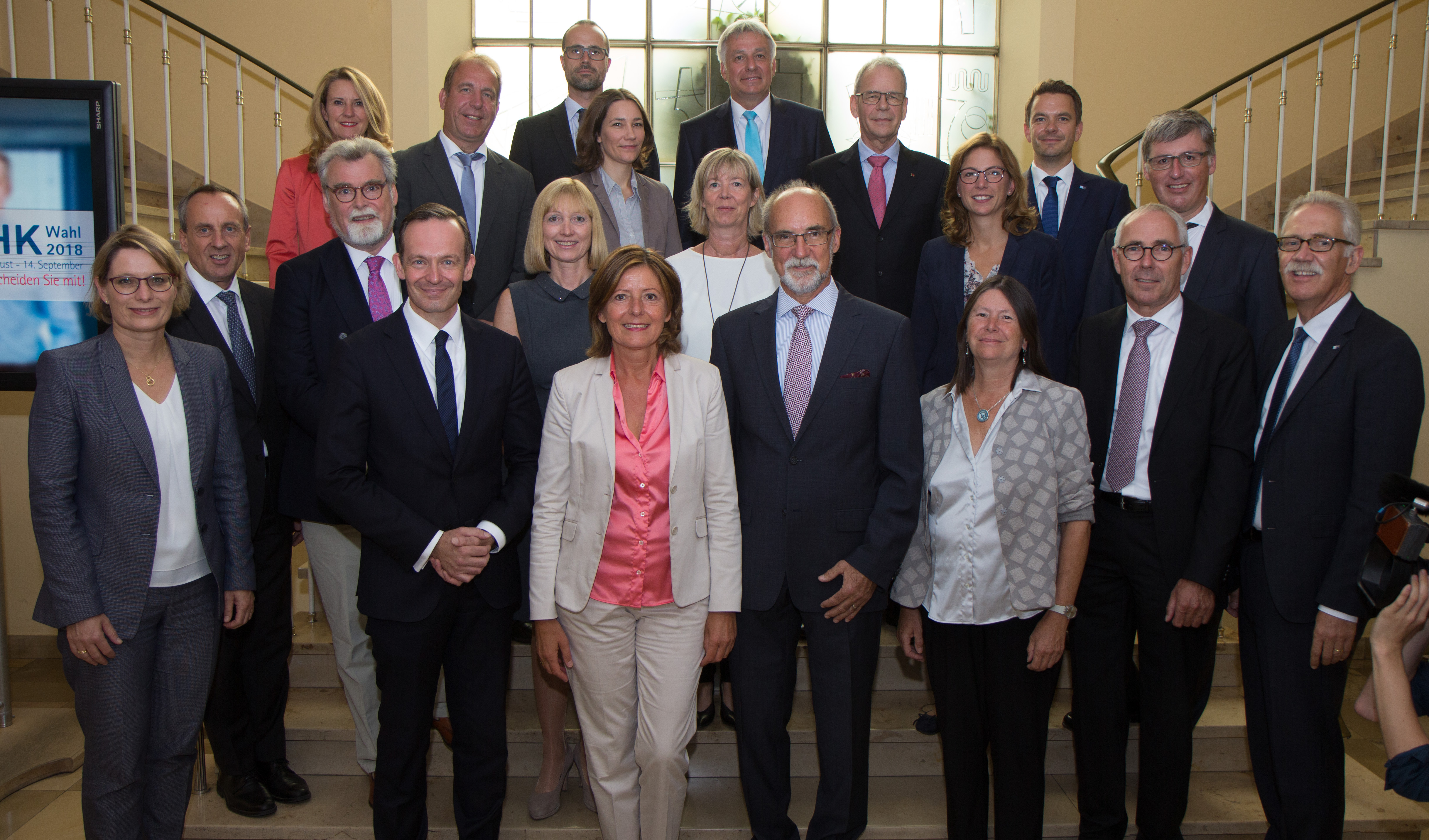 Treffen der IHK-Arbeitsgemeinschaft Rheinland-Pfalz am 14. August 2018 bei der IHK für Rheinhessen in Mainz mit der Landesregierung Rheinland-Pfalz. Erste Reihe (v.l.n.r.): Stefanie Hubig, (Ministerin für Bildung), Volker Wissing (Minister für ür Wirtschaft, Verkehr, Landwirtschaft und Weinbau, Stellvertretender Ministerpräsident), Malu Dreyer (Ministerpräsidentin), Engelbert J. Günster (Präsident, IHK für Rheinhessen), Ulrike Höfken (Ministerin für Umwelt, Energie, Ernährung und Forsten), Peter Adrian (Präsident, IHK Trier), Arne Rössel (Hauptgeschäftsführer (HGF), IHK Koblenz). Zweite Reihe (v.l.n.r.): Konrad Wolf (Minister für Wissenschaft, Weiterbildung und Kultur), Herbert Mertin (Minister der Justiz), Susanne Szczesny-Oßing (Präsidentin, IHK Koblenz), Doris Ahnen (Ministerin der Finanzen), Sabine Bätzing-Lichtenthäler (Ministerin für Soziales, Arbeit, Gesundheit und Demografie), Jan Glockauer (Hauptgeschäftsführer, IHK Trier). Dritte Reihe (v.l.n.r.): Heike Raab (Bevollmächtigte des Landes Rheinland-Pfalz beim Bund und für Europa, Medien und Digitales), Randolf Stich (Staatssekretär im Innenministerium), Anne Spiegel (Ministerin für Familie, Frauen, Jugend, Integration und Verbraucherschutz), Albrecht Hornbach (Präsident, IHK Pfalz), Tibor Müller (HGF, IHK Pfalz). Vierte Reihe (v.l.n.r.): Clemens Hoch (Chef der Staatskanzlei), Günter Jertz (HGF Rheinhessen).